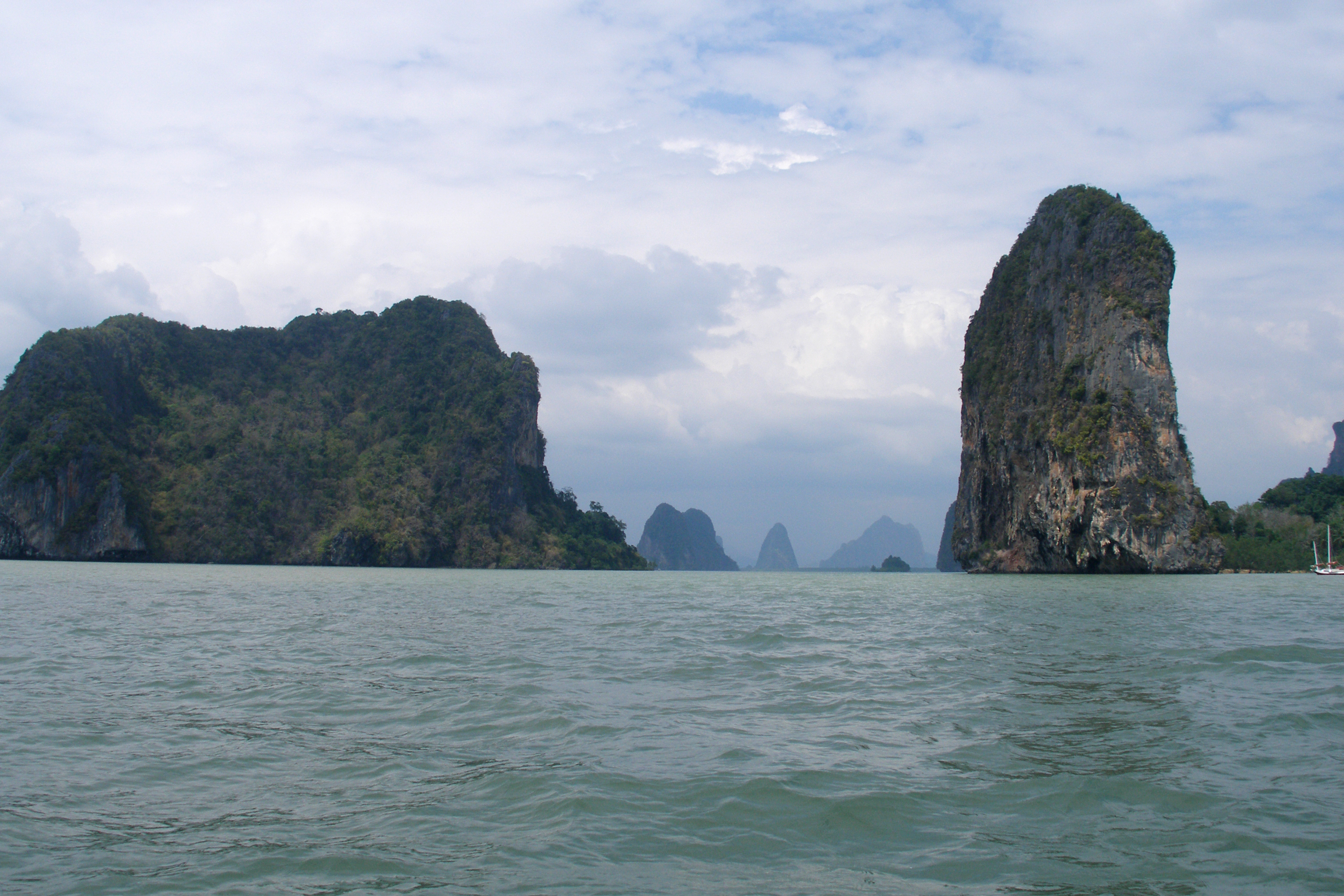 อุทยานแห่งชาติอ่าวพังงา